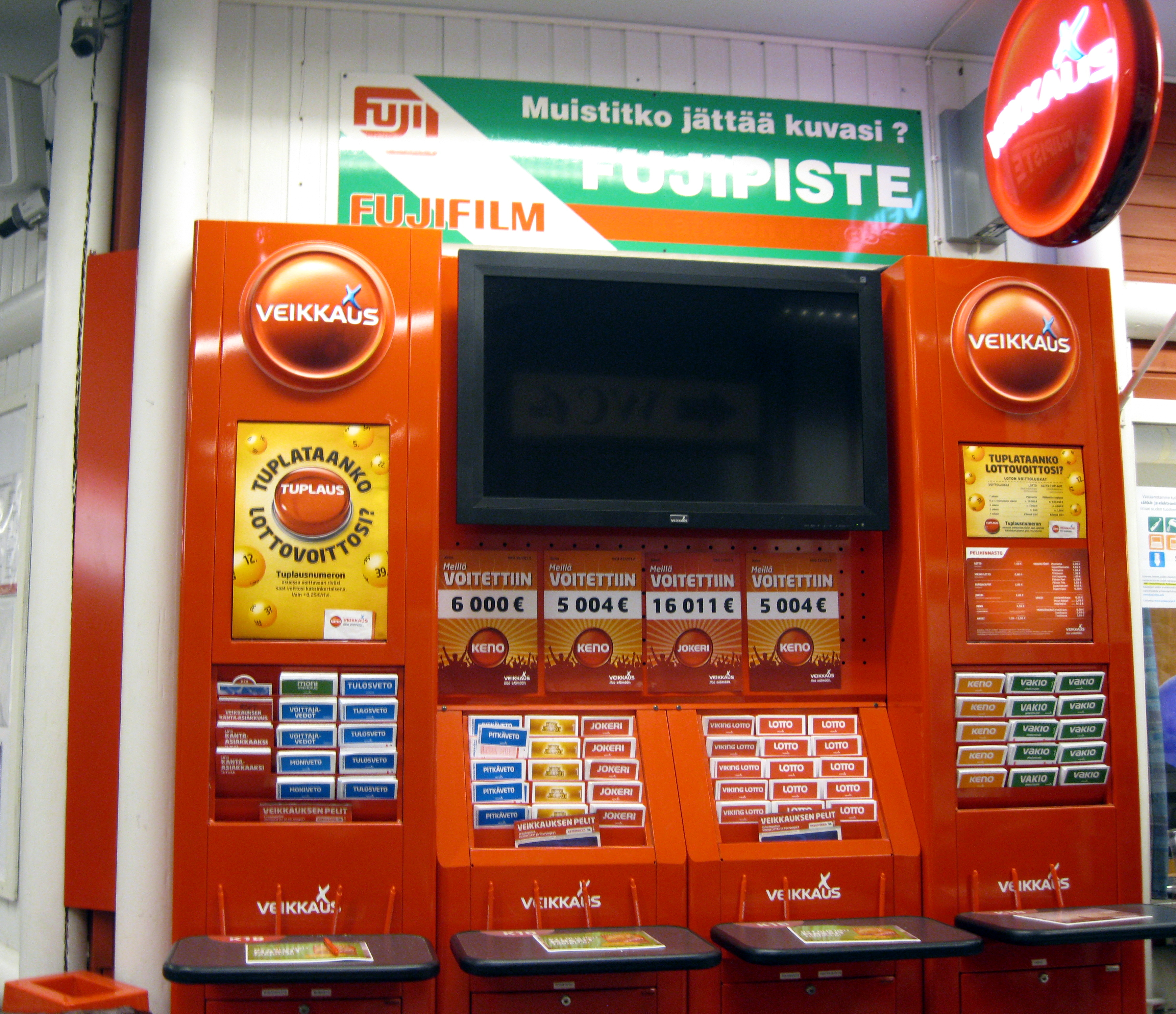 Veikkauspiste, Tuurissa 2014.